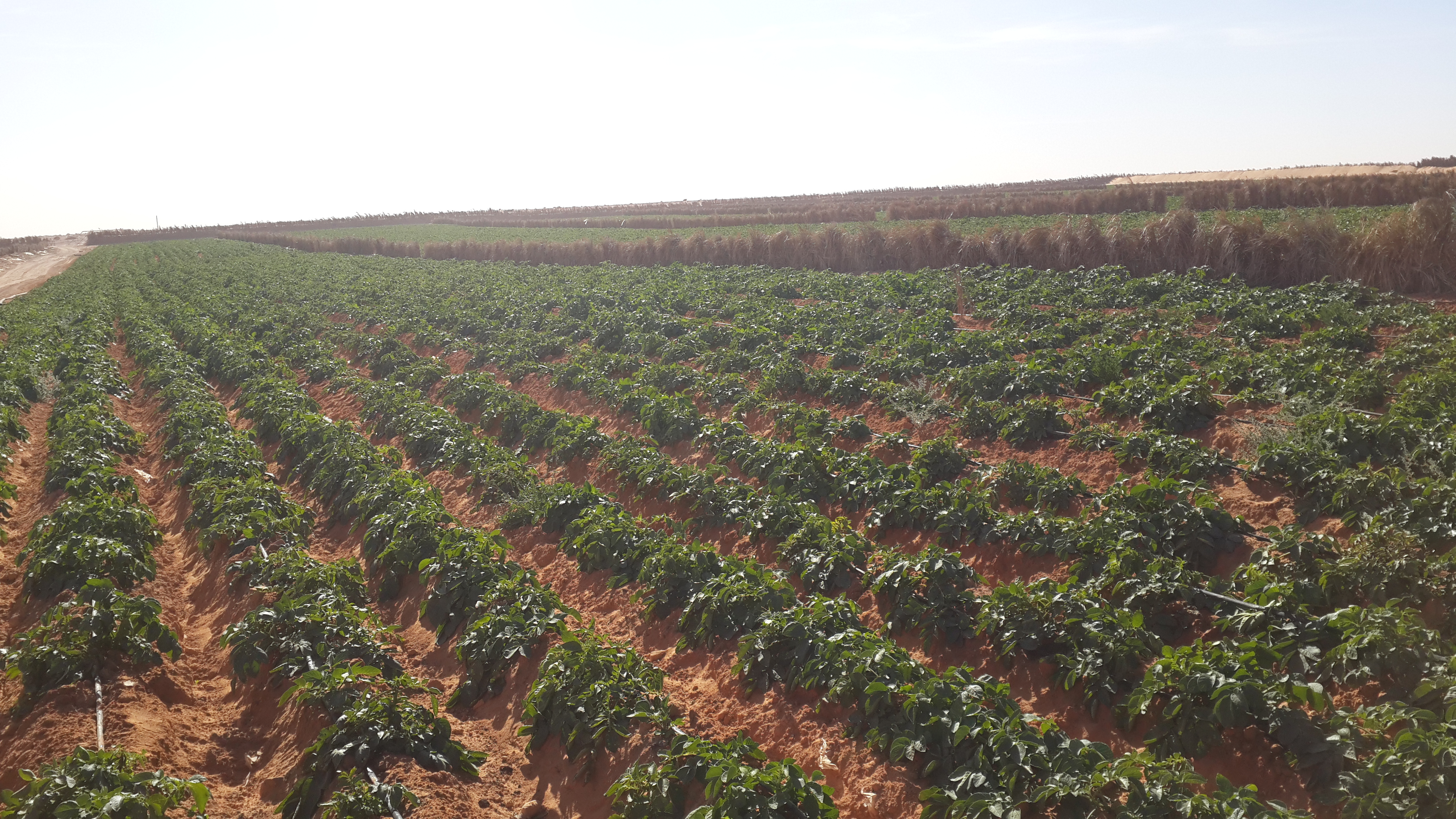 L'ORSQUE L'HOMME DEFIT LA NATURE , UN PECTACLE JUSTE EPHEMERE